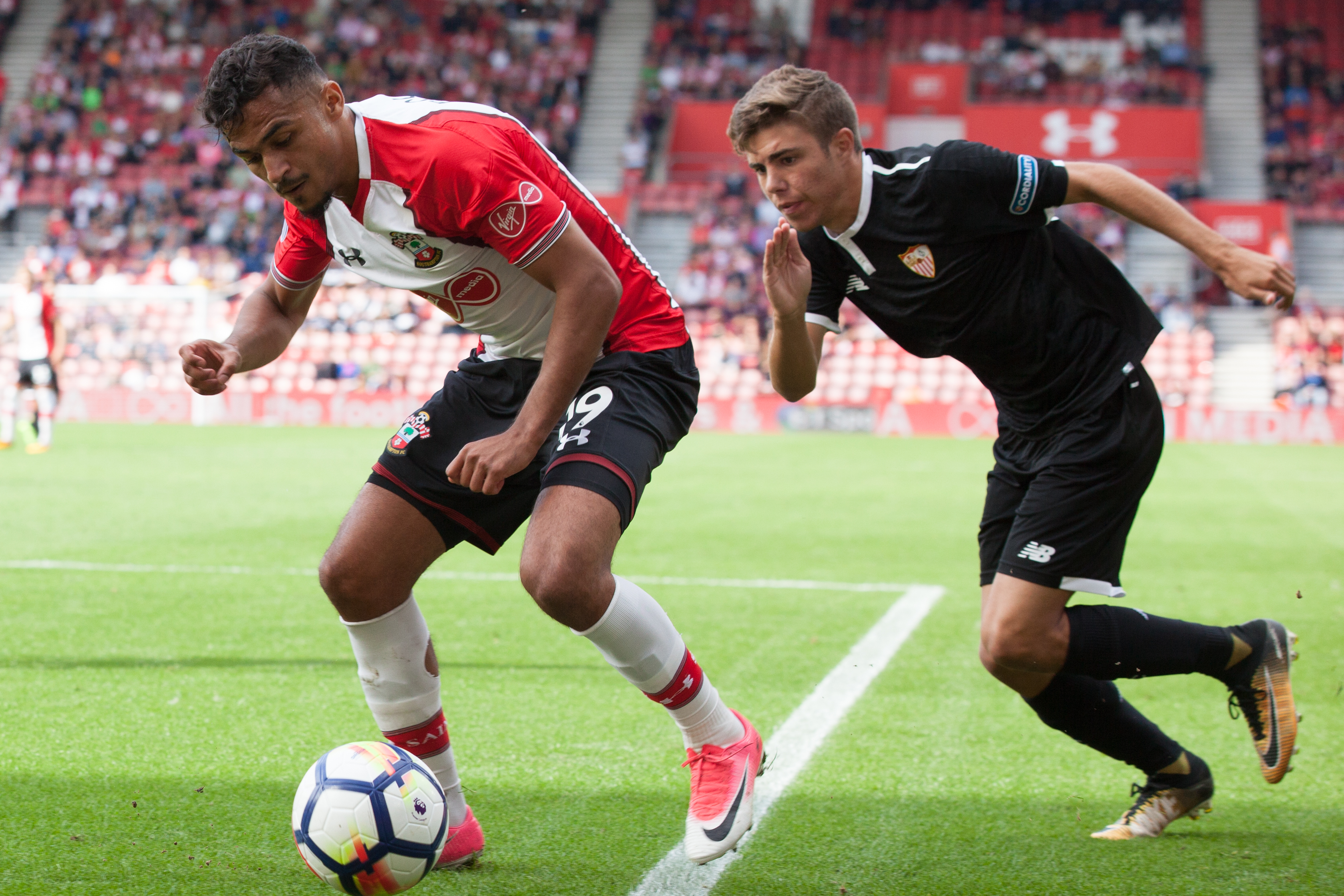 Image by Steve Hogg